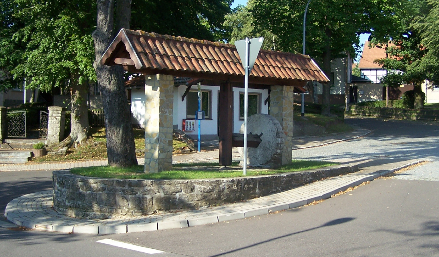 Ein Waidmühlstein im Zentrum der Ortslage Craula.